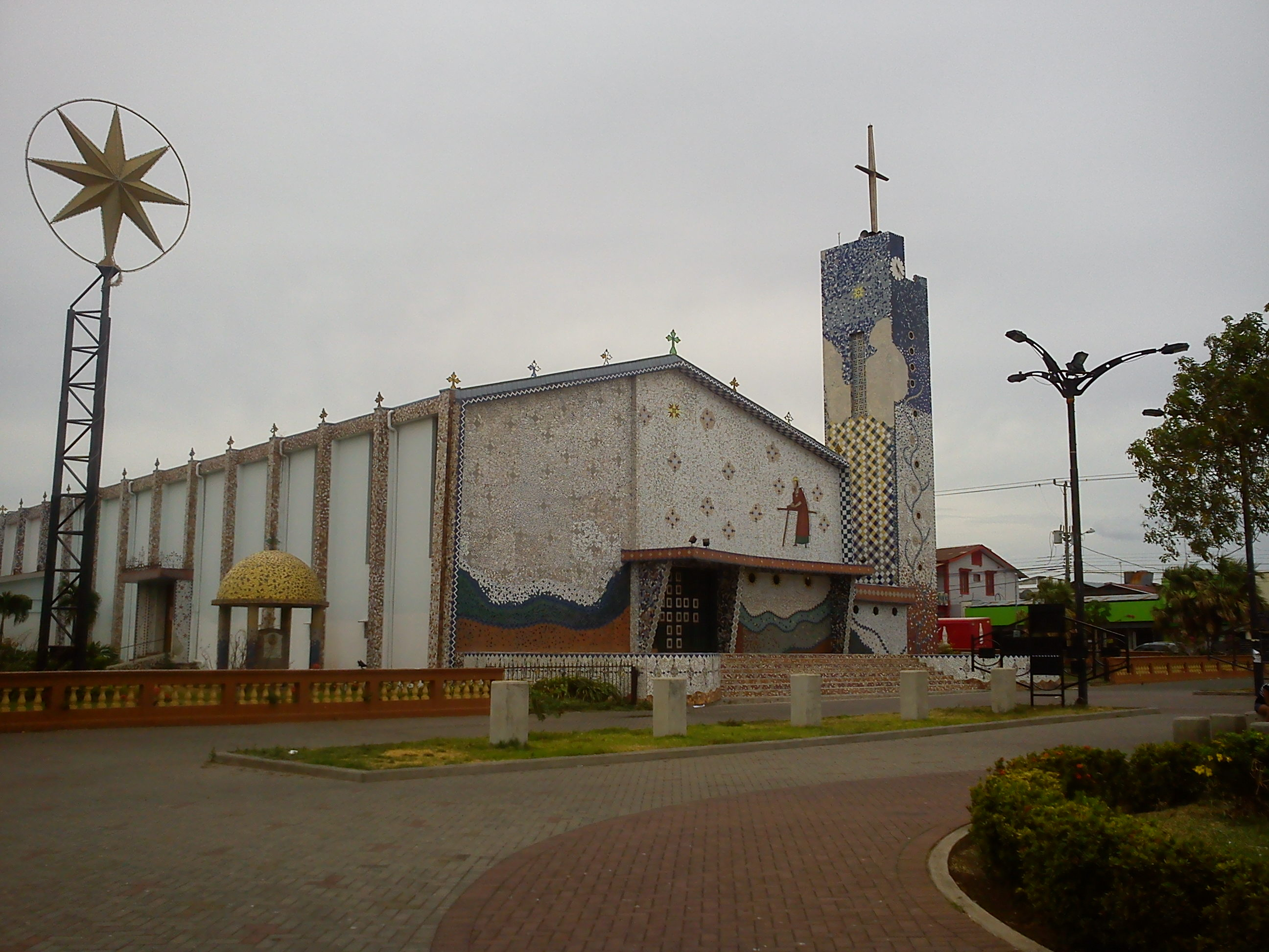 Templo católico en Cañas, Guanacaste. Costa Rica.